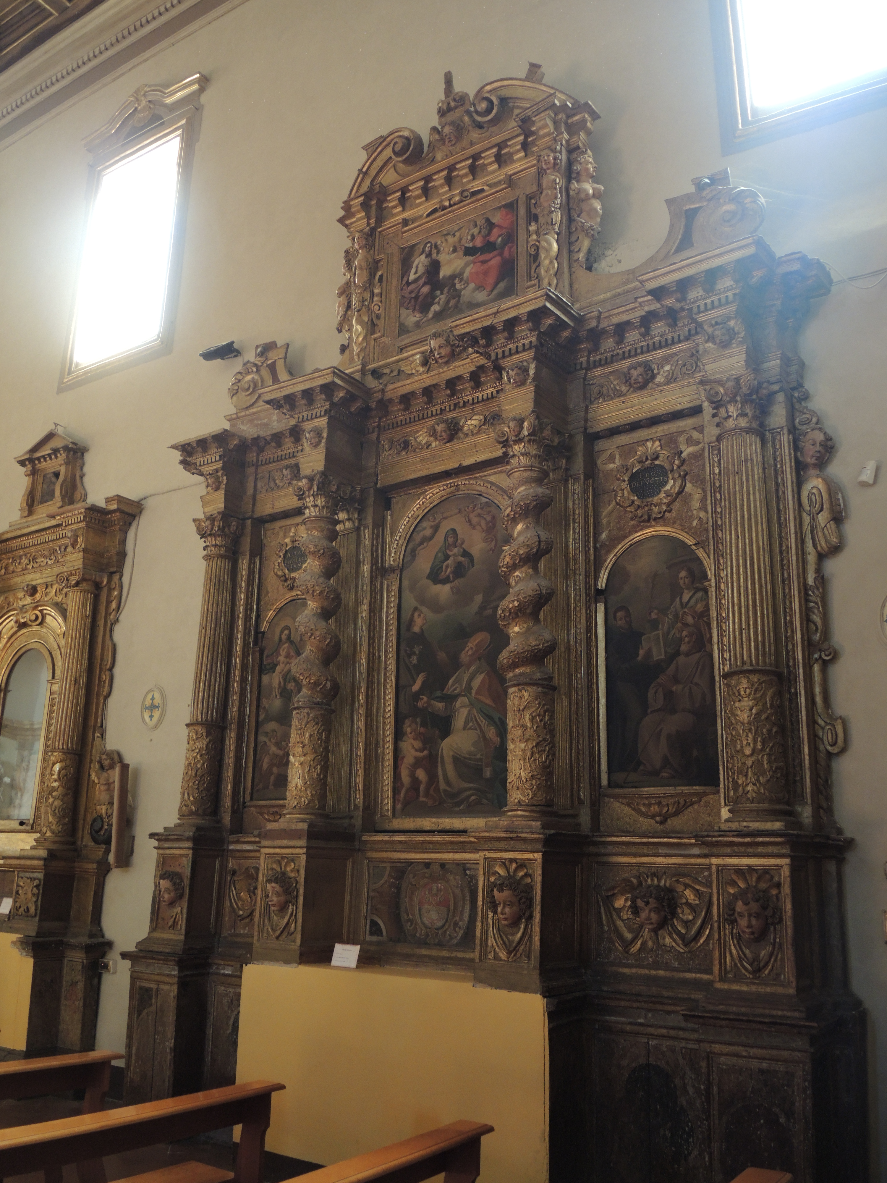 Città Sant'Angelo: Collegiata di San Michele Arcangelo